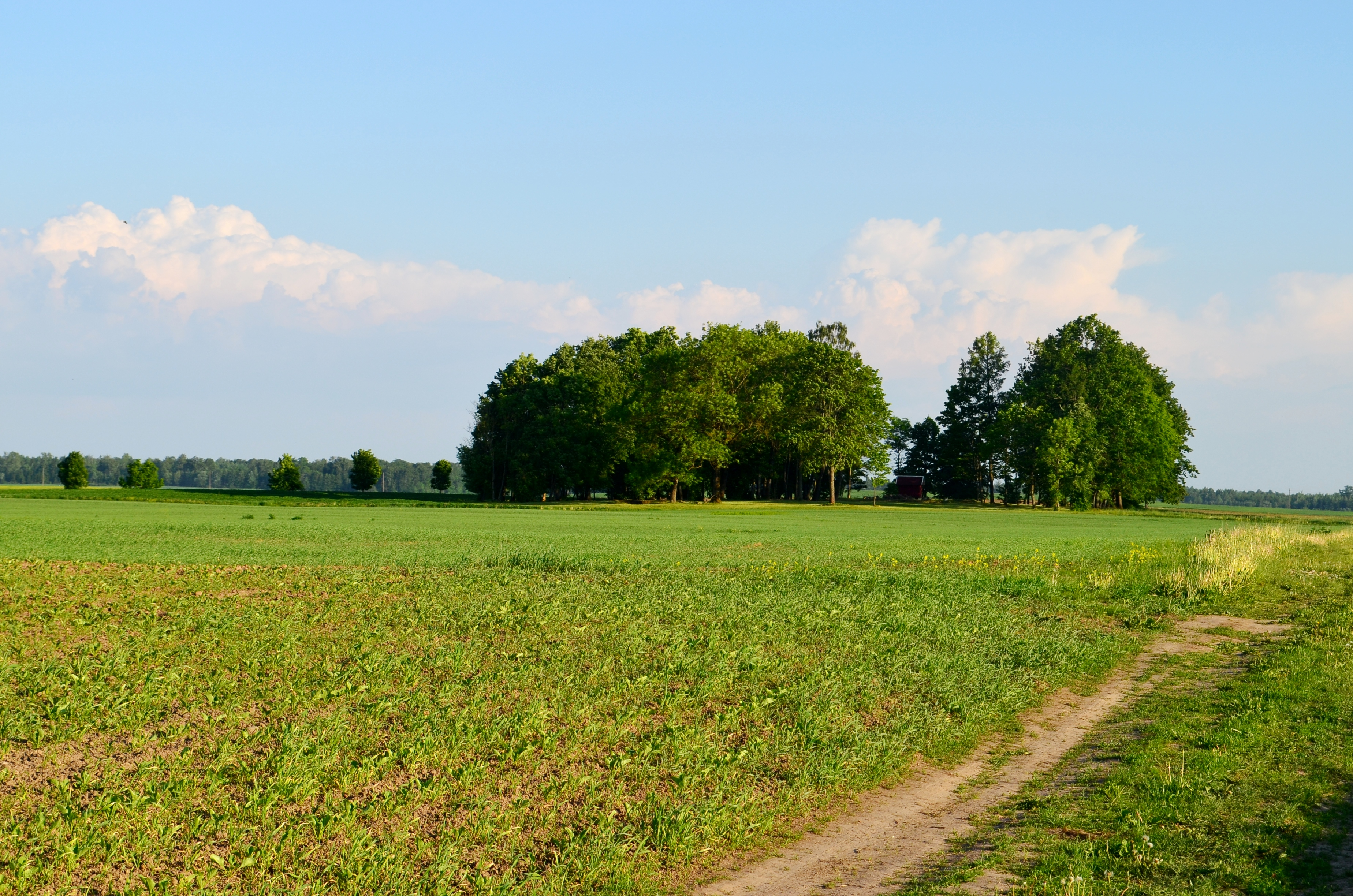 Vytautėliai, Kėdainių raj.